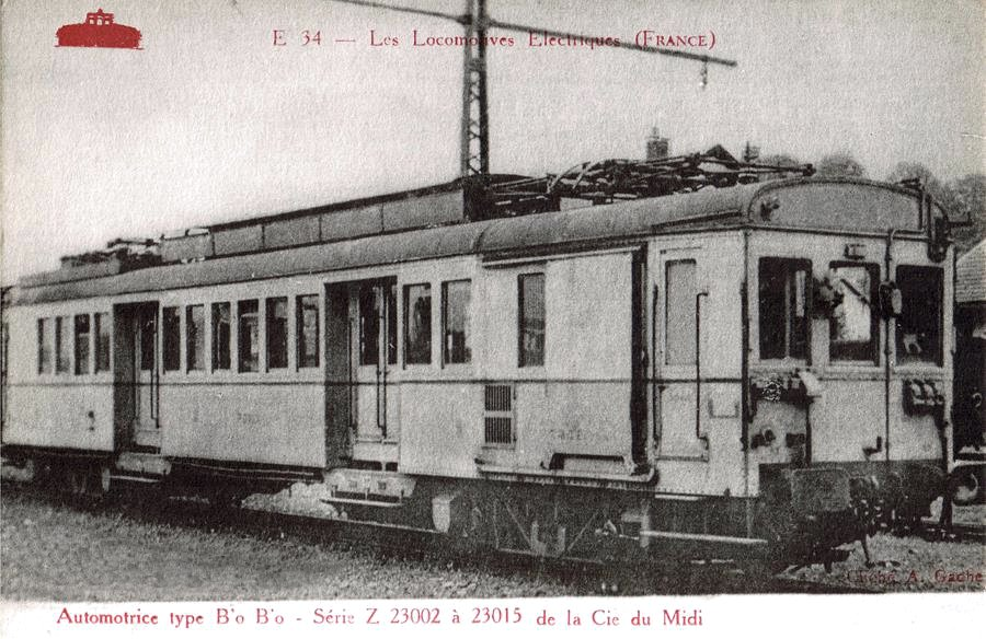 Automotrice Midi Z 23002 à 15, futures SNCF Z 4300.